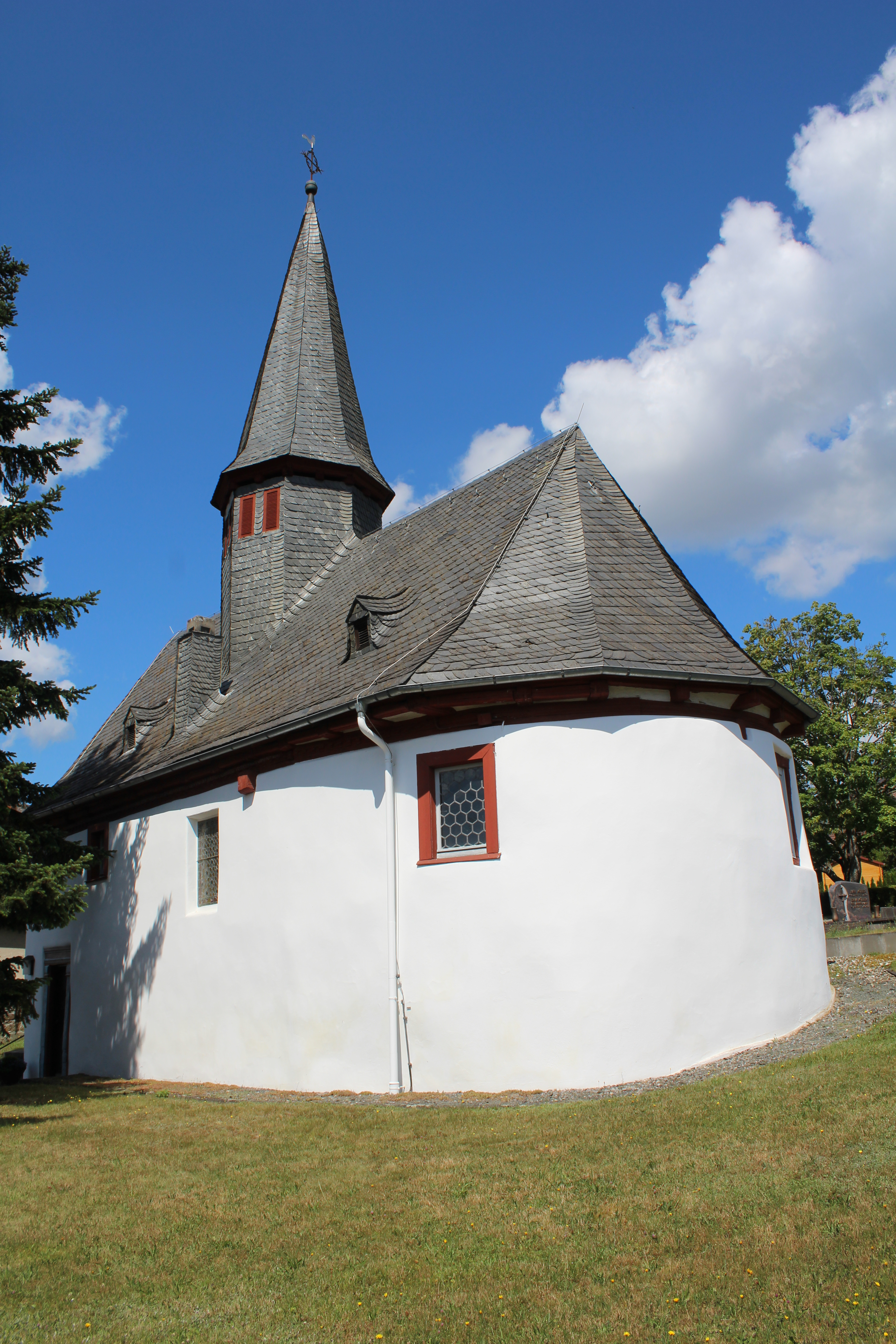 Evangelische Kirche Niederquembach, Gemeinde Schöffengrund, Hessen, Deutschland